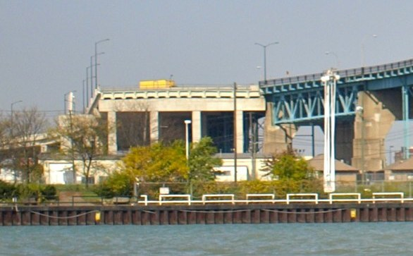 Detroit River